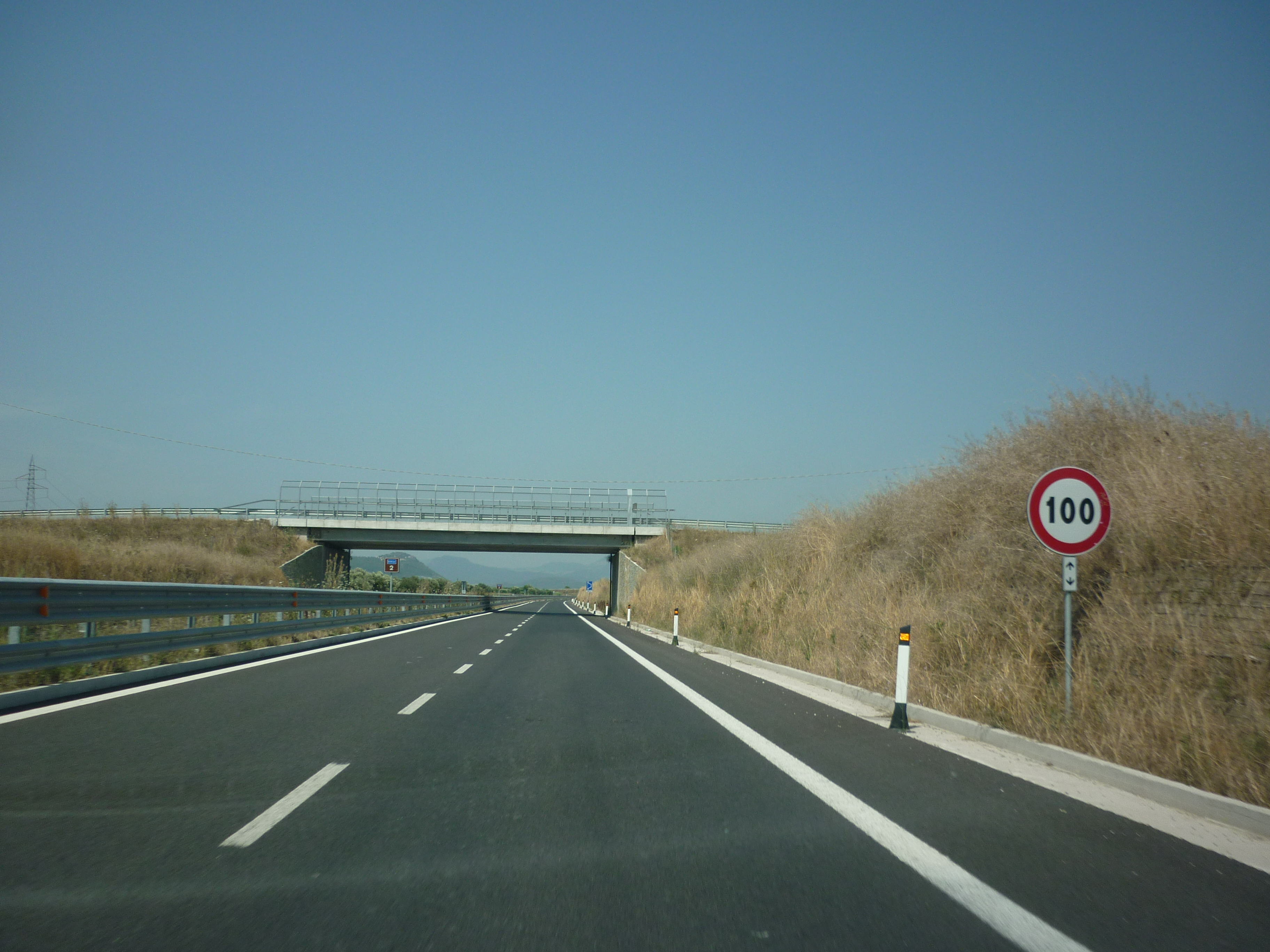 SS85var